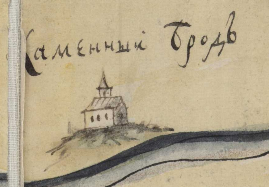 Фрагмент карти Київської губернії. XVIII століття. РГАДА, ф. 192, оп. 1, Киевская губ., № 5.